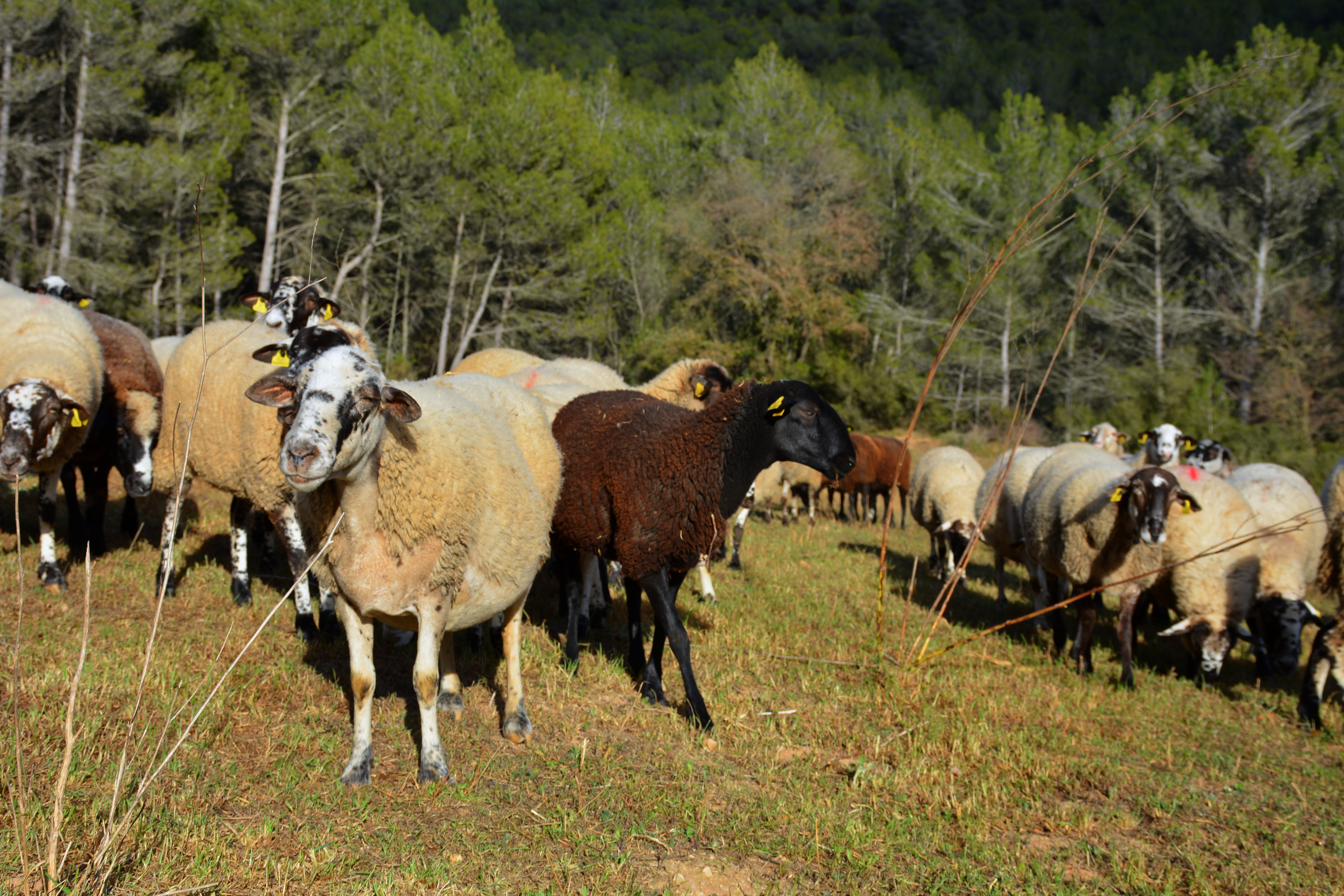 Ovelles Gavarrossa, Torrelles de Foix, Alt Penedès.